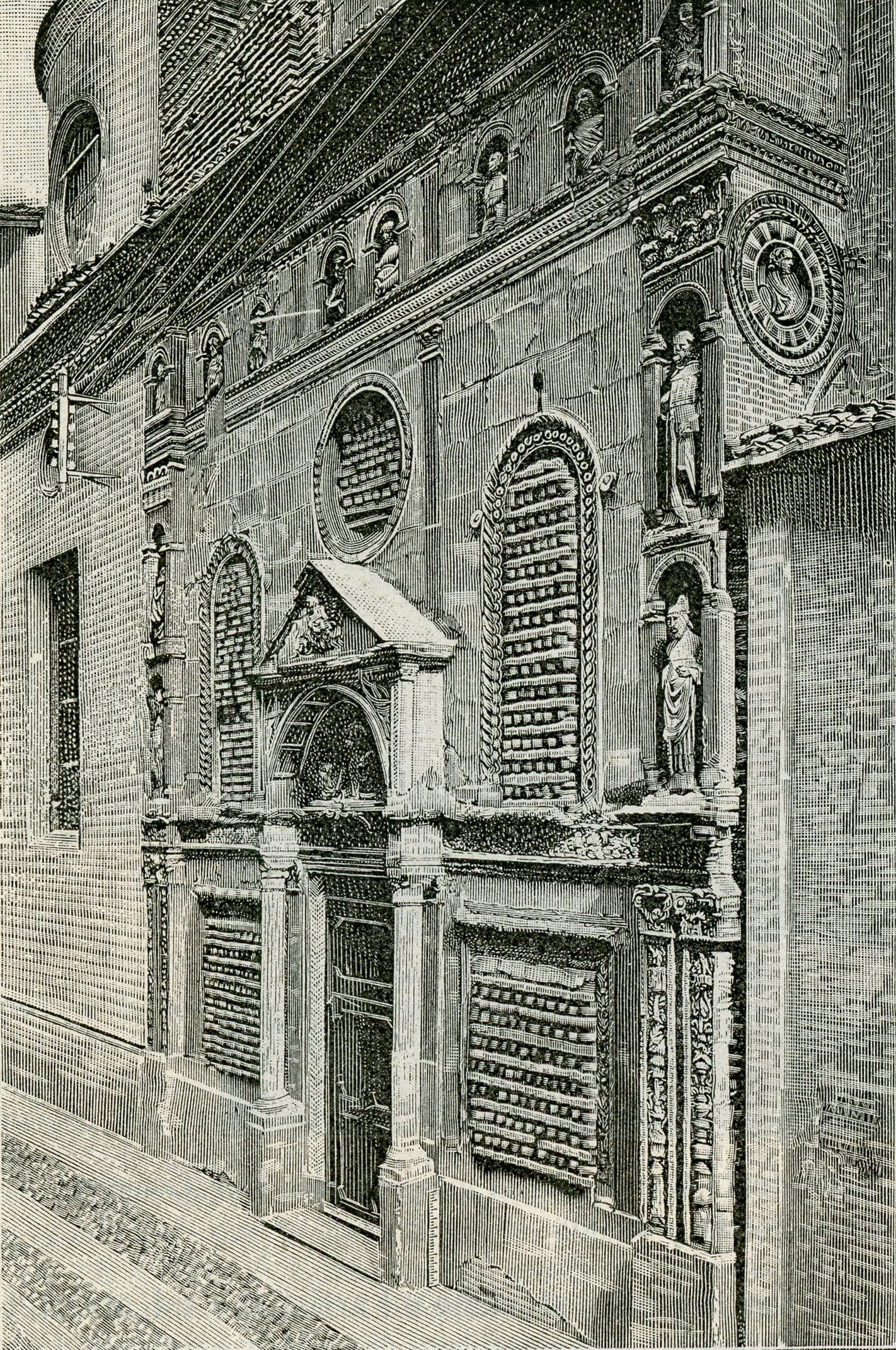 Bologna: Porta della chiesa della Madonna di Galliera (xilografia).